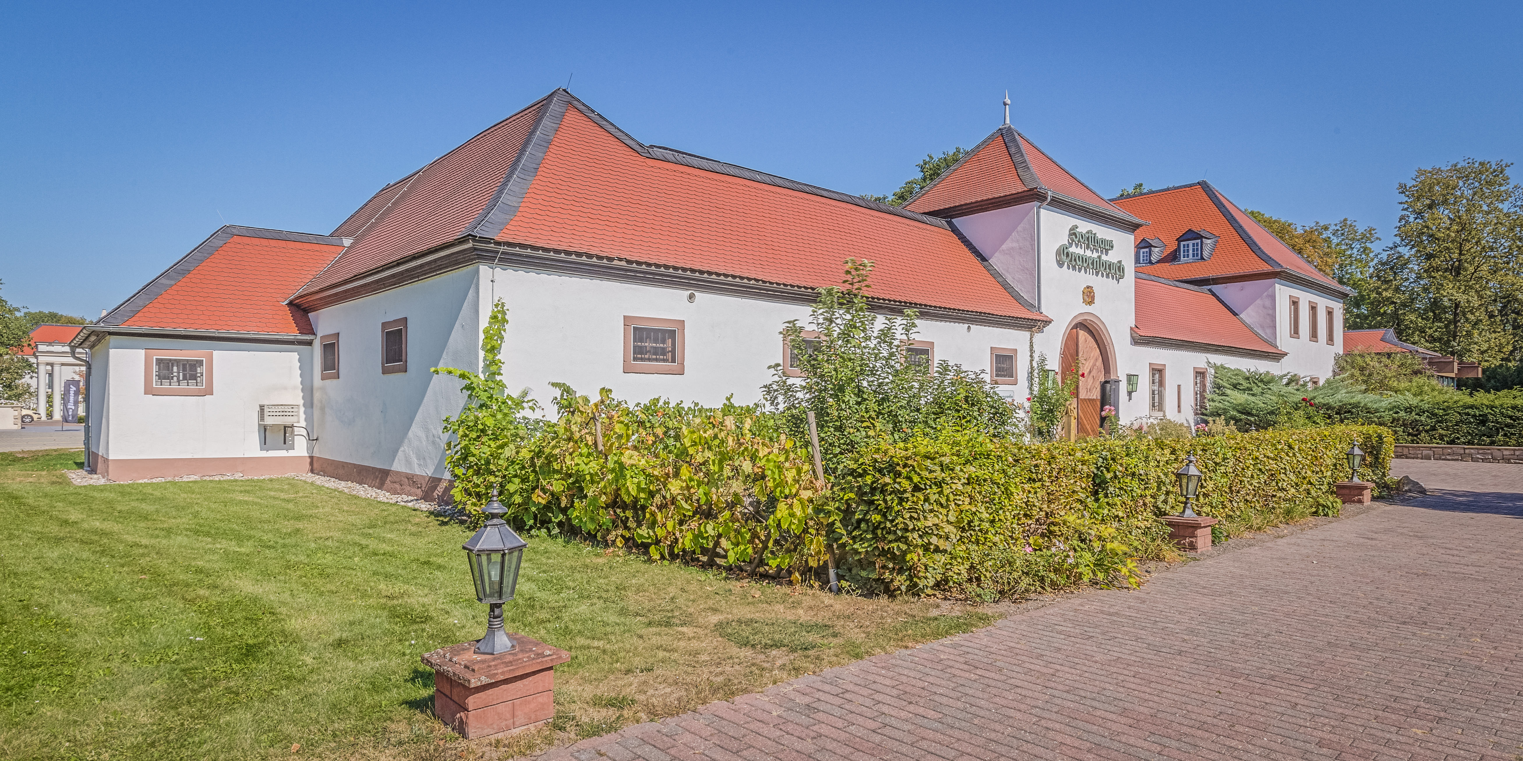 Forsthaus Gravenbruch, Grundsteinlegung vermutlich 1536 durch Sebastian von Heusenstamm und heute Teil der Kempinski Hotelanlage.